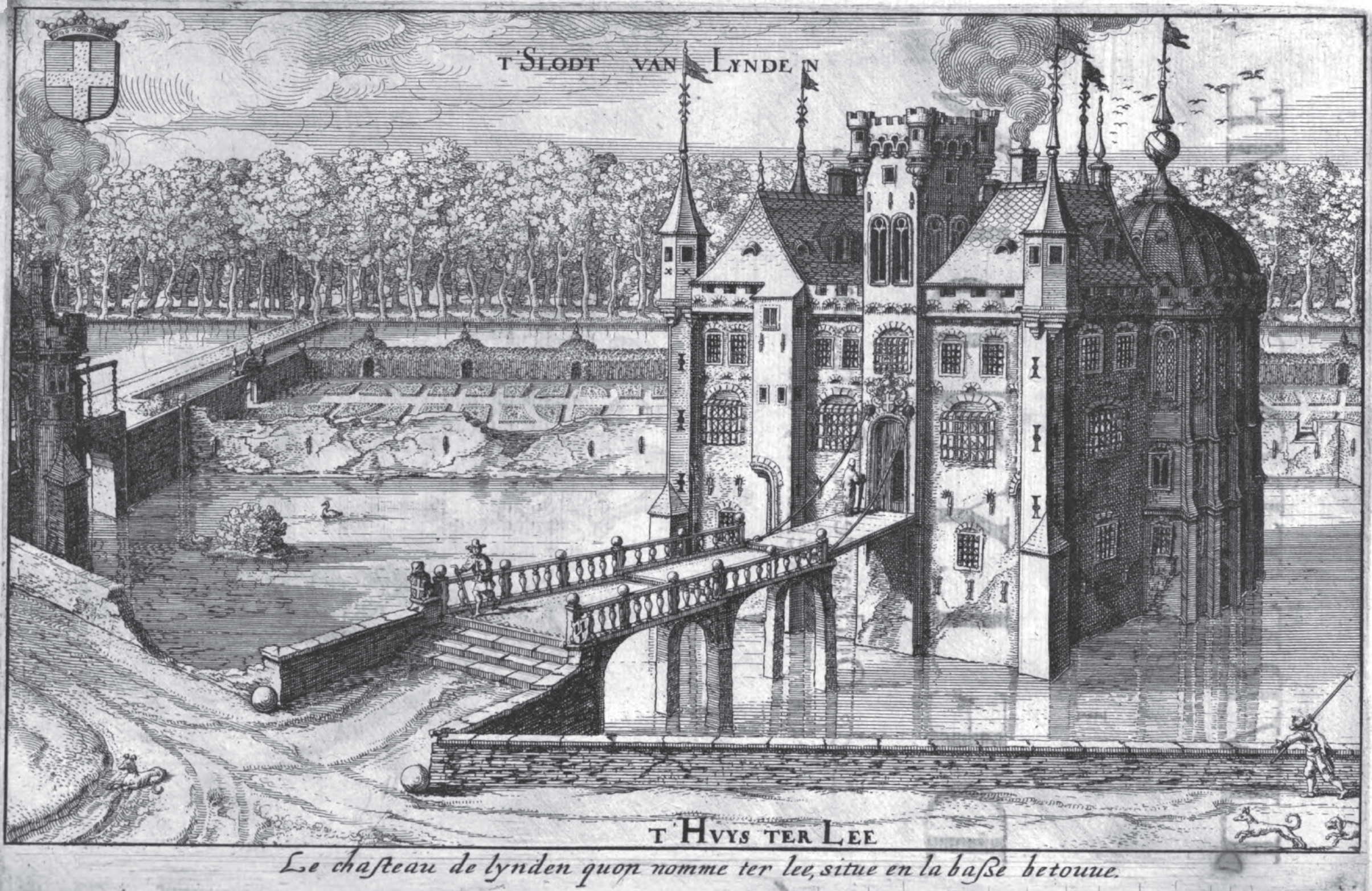 Chateau de ter Lede a Lynden. Annales généalogiques de la Maison de Lynden. Christophe Butkens. Anvers, 1626.